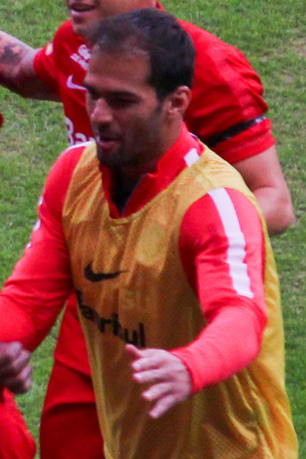 Aylon no Inter em 2016